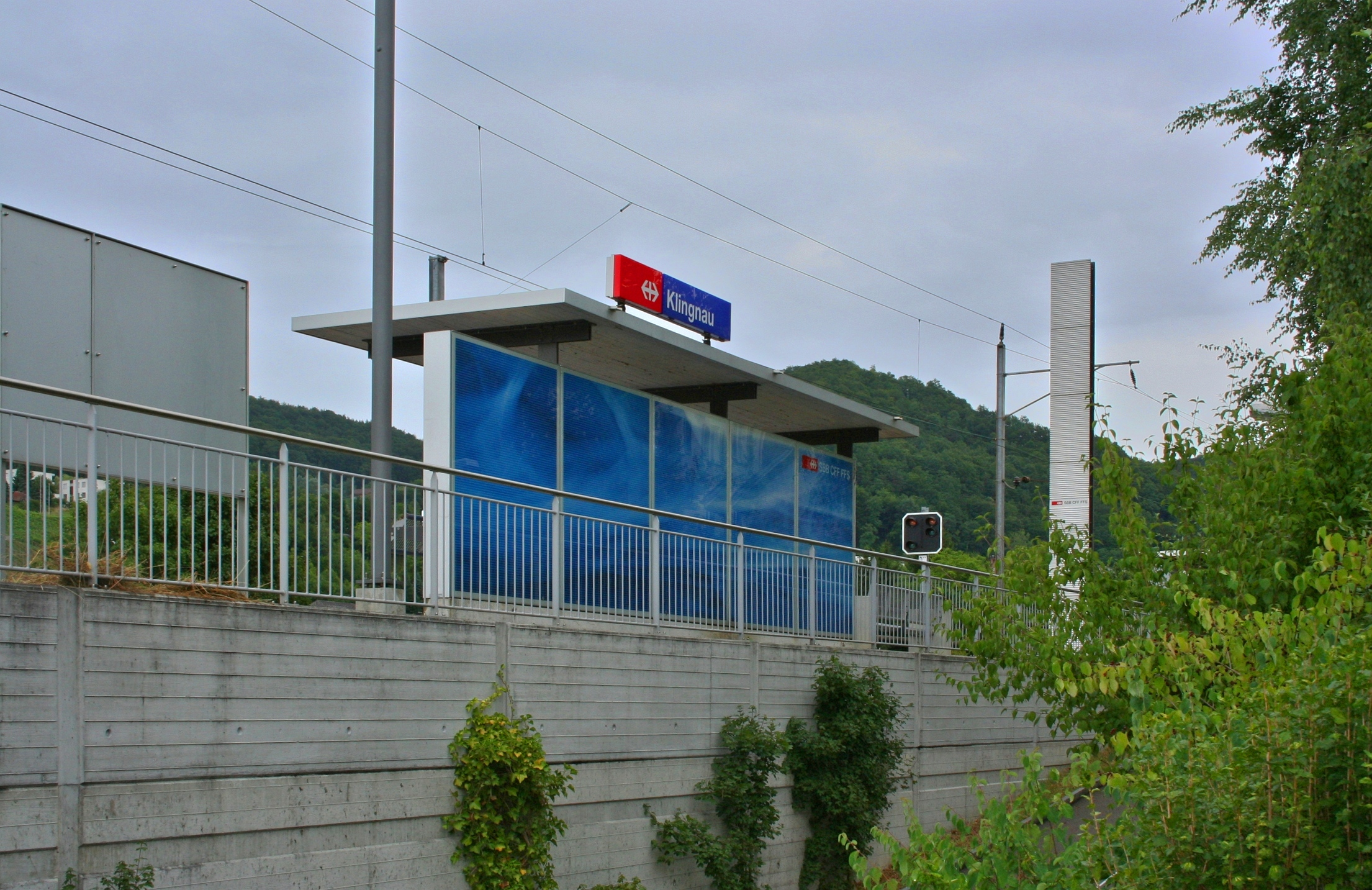 Bahnhaltestelle Klingnau